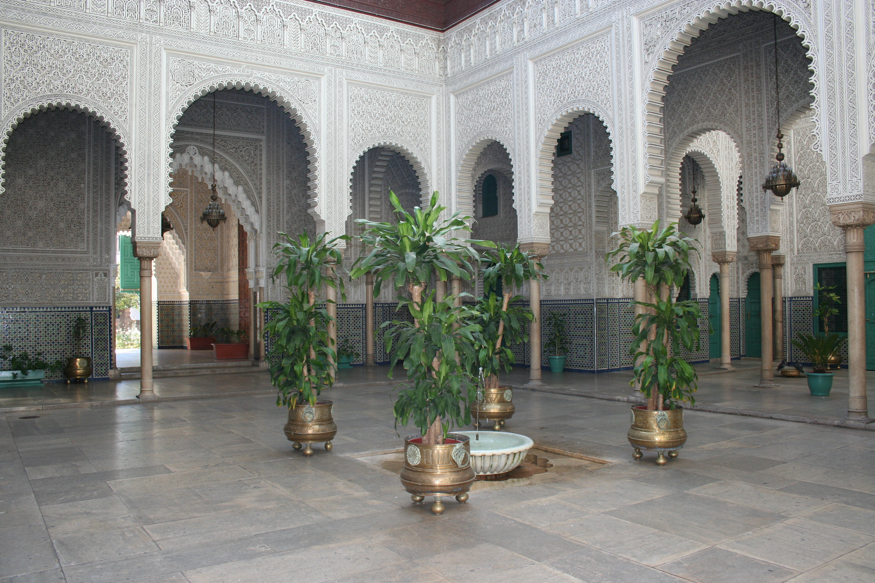 Mahkama Pacha es un edificio que sirve a su vez de tribunal y de salón oficial de recepciones en el distrito de Habous, Casablanca. Cuenta con más de 60 habitaciones situadas alrededor de dos patios, recordando a los antiguos palacios arabo-andaluces.